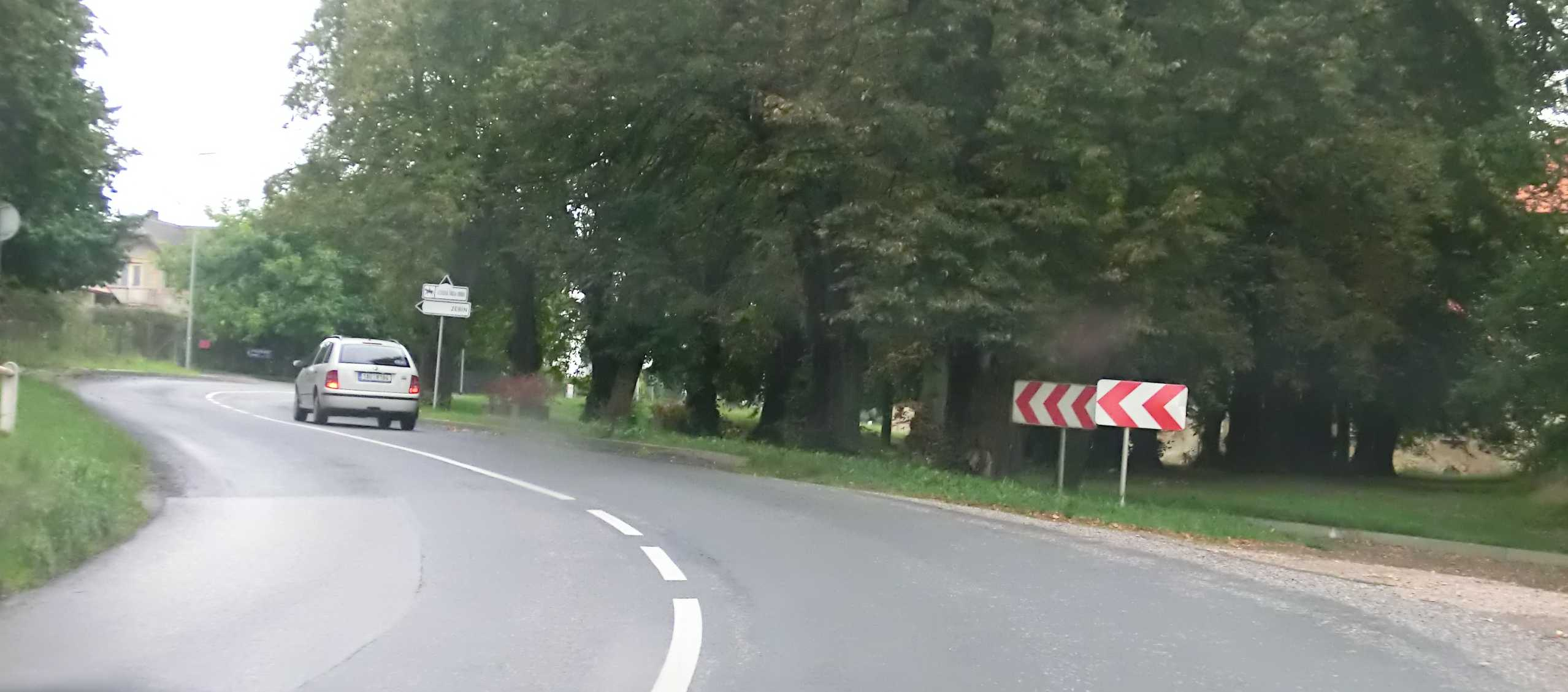 Silnice Jičín - Lomnice n.P. křižuje Valdštejnskou alej v obci Sedličky.